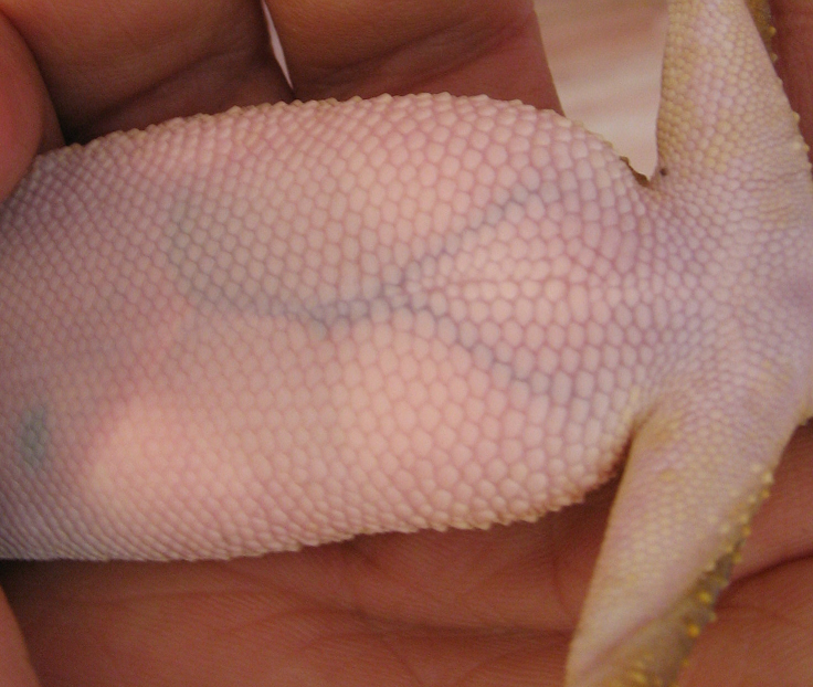 Original: 09-05-06-tangerine schwanger.jpg